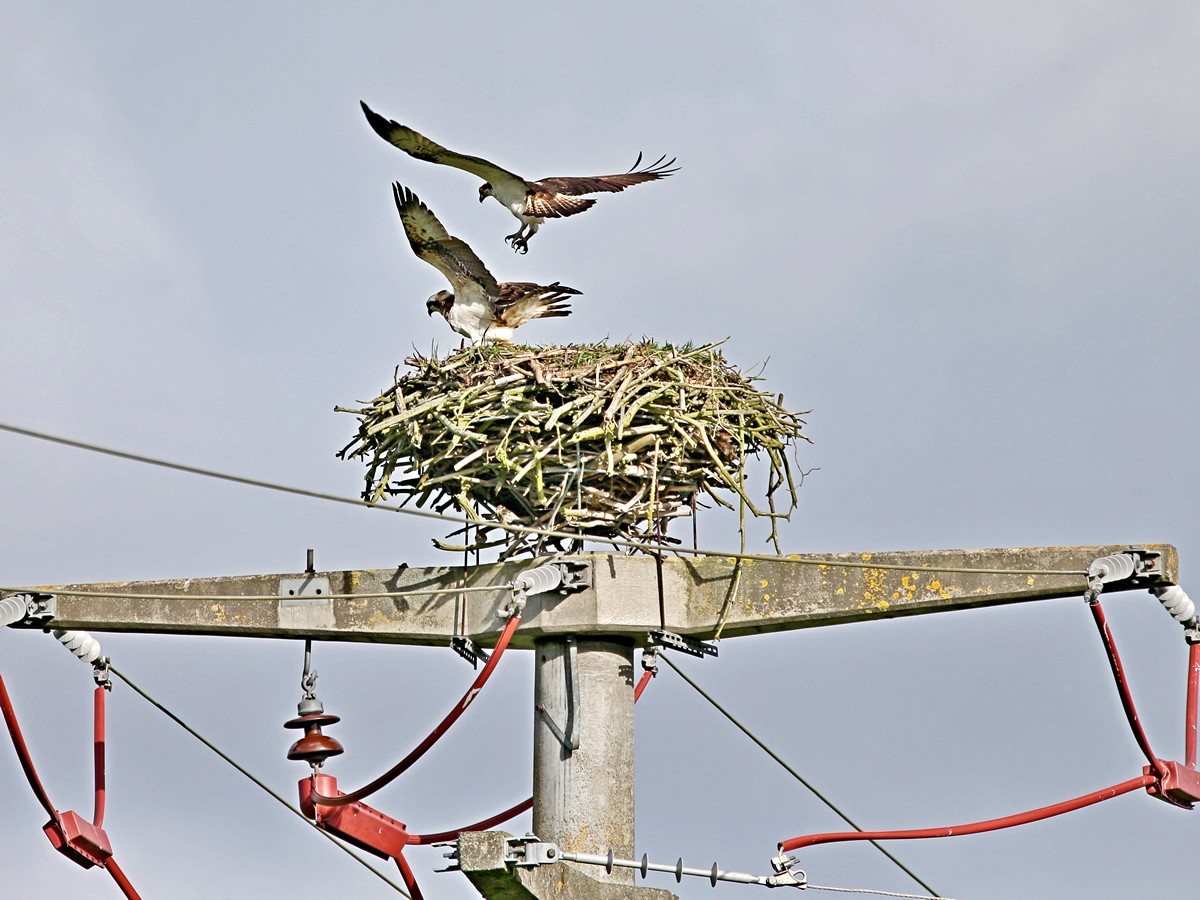 Fischadler am Masthorst, Mecklenburg